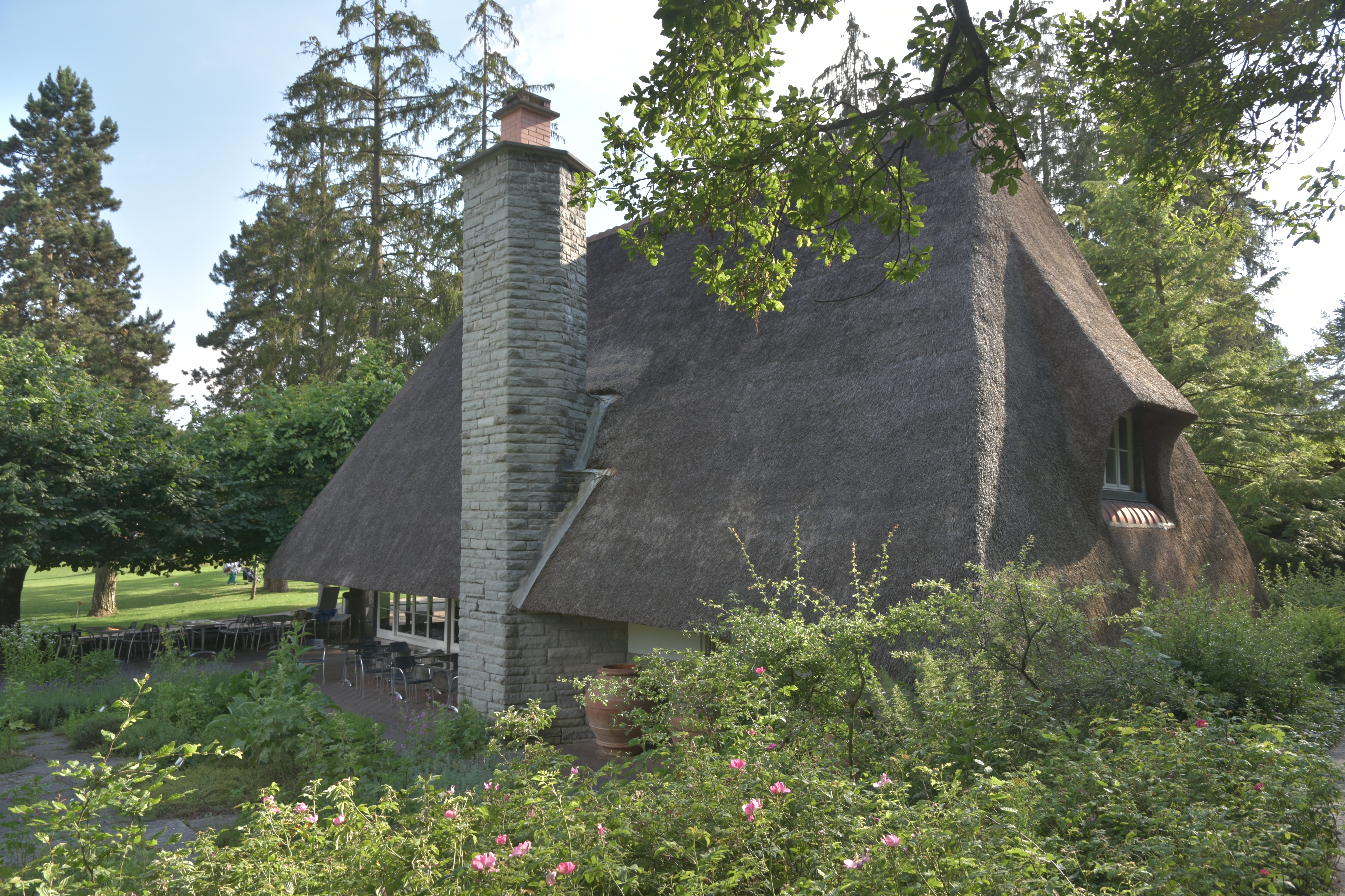 Adele & Gottlieb Duttweiler's' Park im Grüene in Rüschlikon (Switzerland)